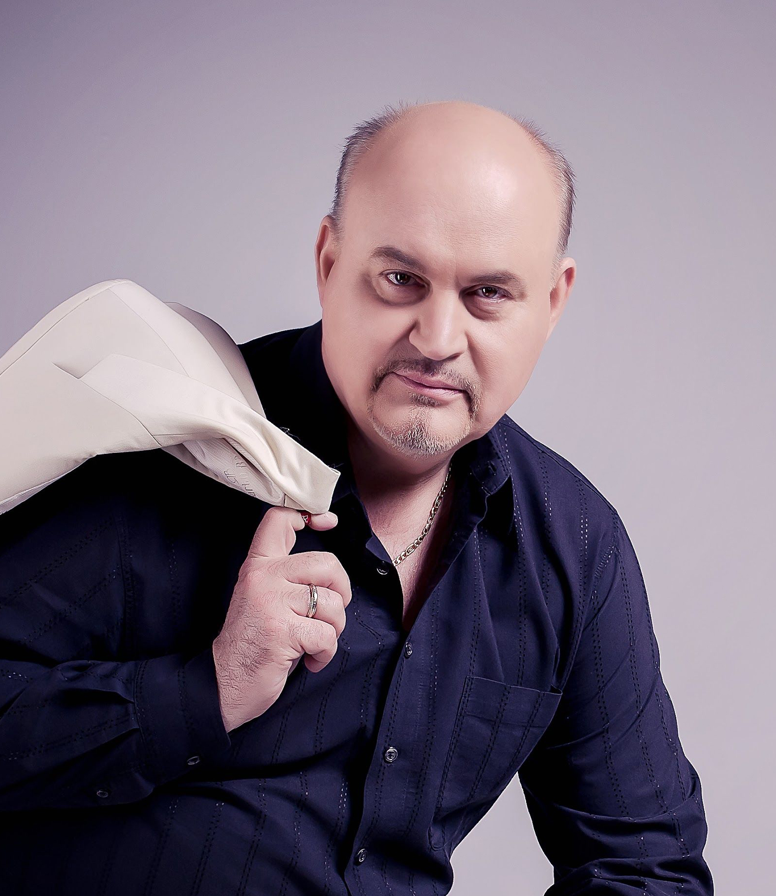 Фото Ігор Борко велика